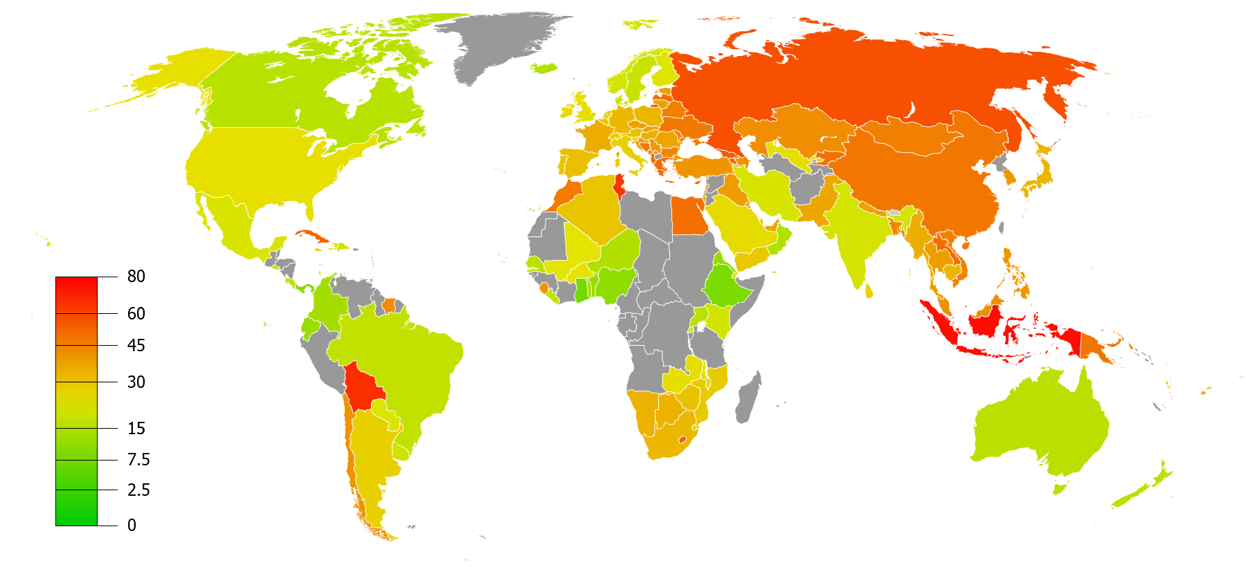 この 画像はGunnMapで作成されましたGunnMap は Arthur Gunn (User:Aaaarg) によって開発されたもので、無償で利用できます。 画像を利用の際は、出典として へのリンクを付記してください。